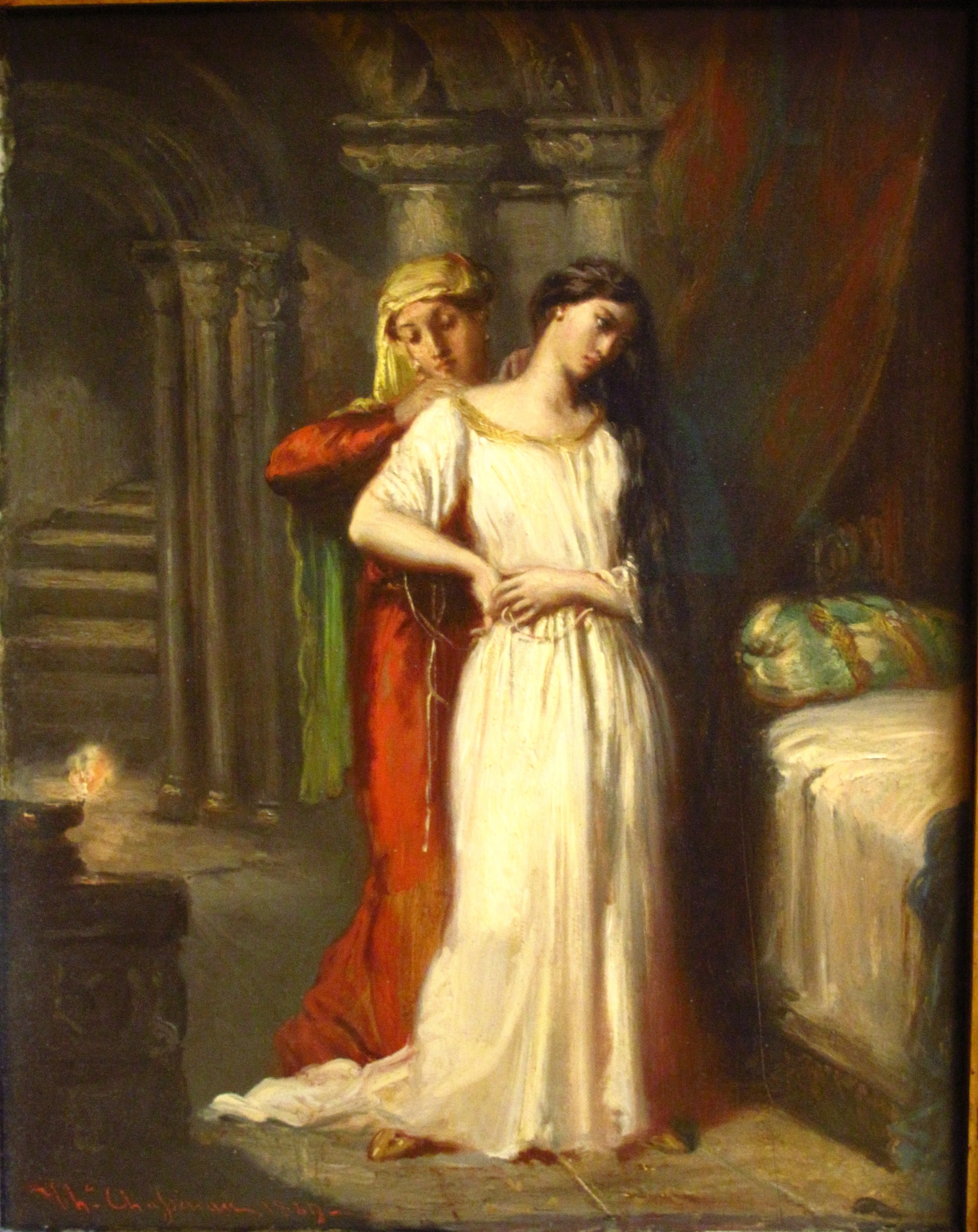 Desdémone est apprêtée par sa servante lors de son coucher. Reprise de la composition de la huitième estampe gravée par l'artiste en 1844, estampes de la suite d'Othello.